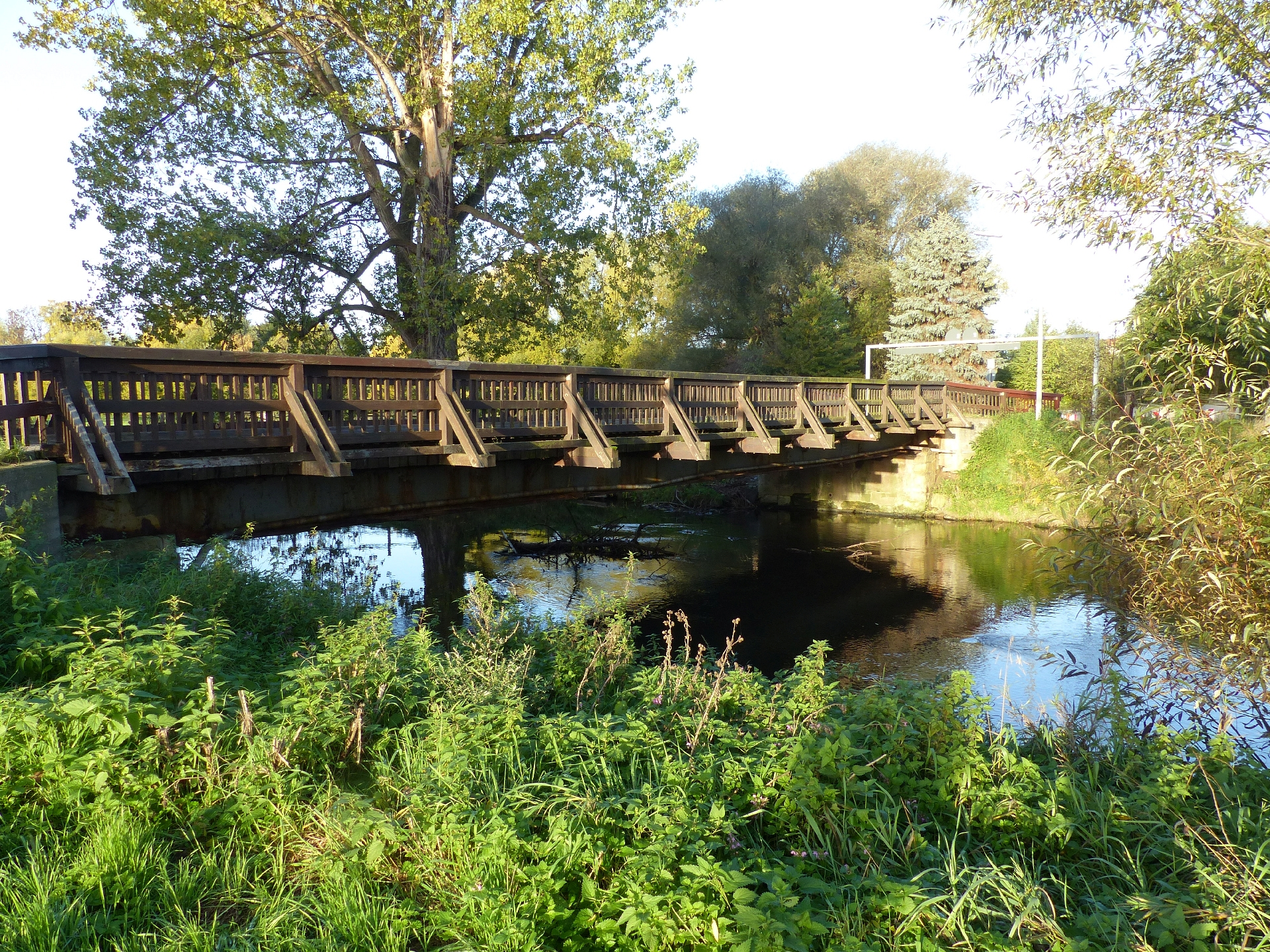 Okerbrücke Leiferde, Nordansicht Oktober 2015.